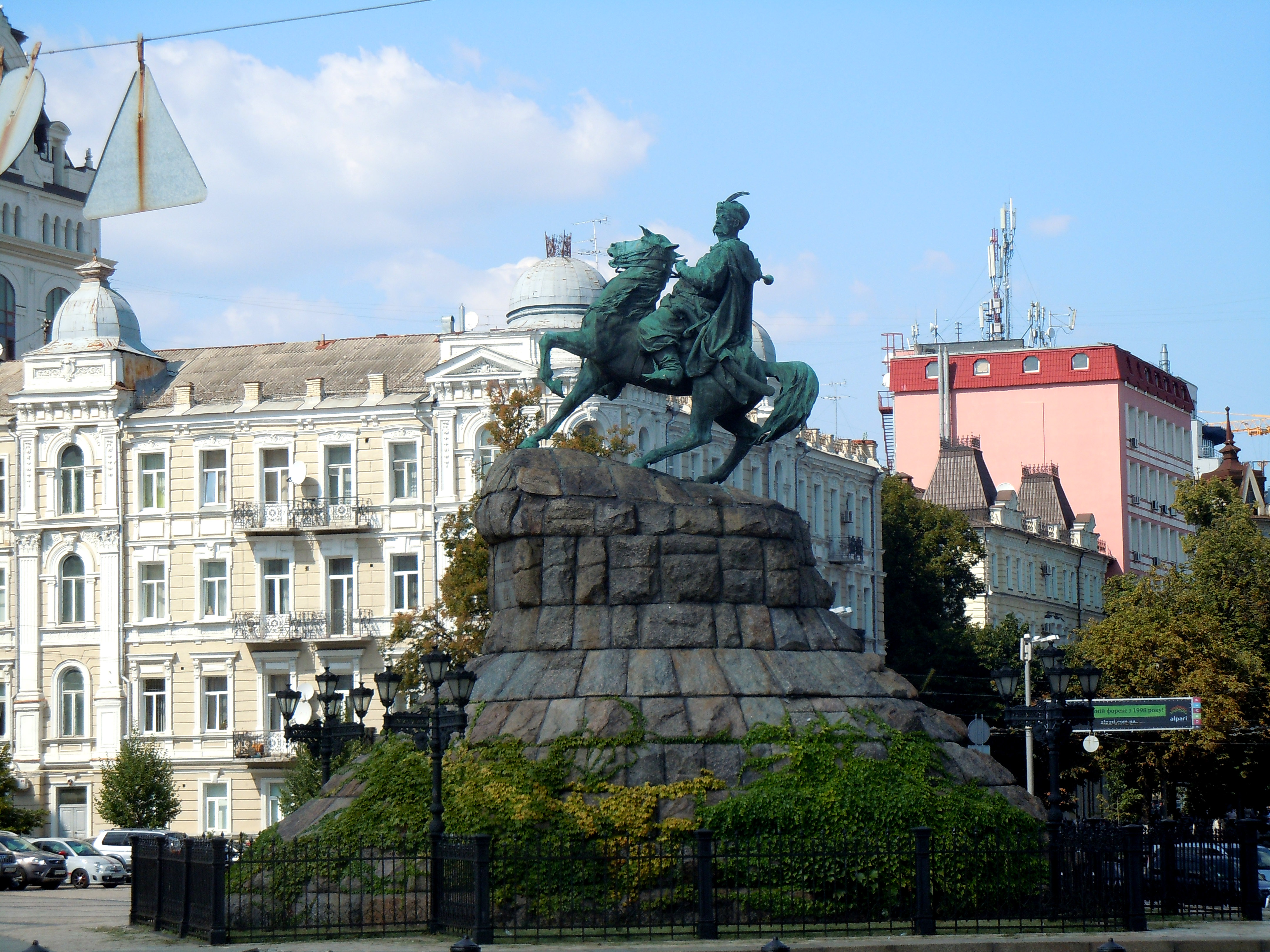 Пам'ятник гетьману Богдану Хмельницькому, Київ, Софійська площа